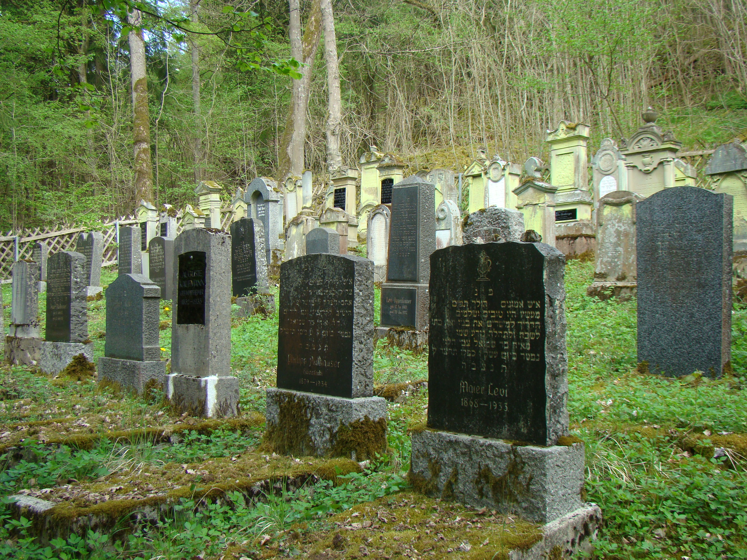 Jüdischer Friedhof in Sennfeld (Adelsheim), Kriegerdenkmal